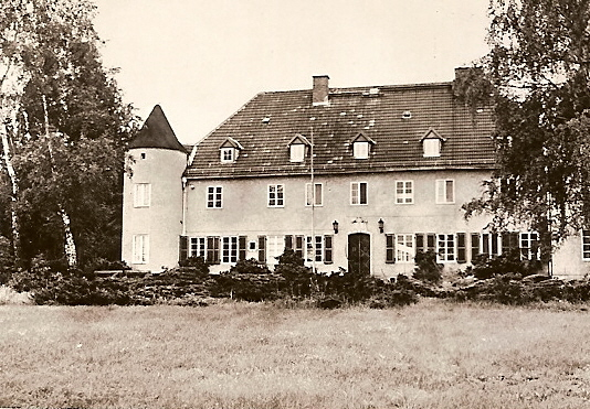 Die Vorderansicht vom Schloss Dahmshöhe-ältere Aufnahme